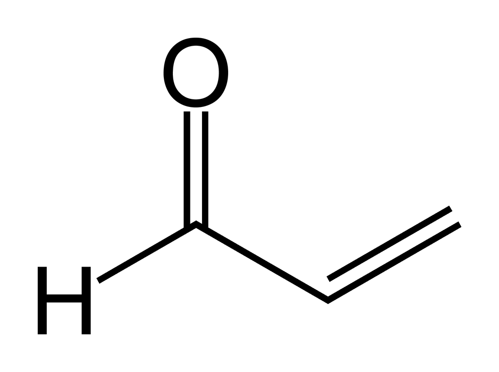 Estructura química de la Acroleína Description: Skeletal formula of acrolein (2-propenal, C3H8O). Author, date of creation: self made by Ben Mills at 15:01, 9 March 2006 (UTC). Source: user-created image Comments: high-resolution black and white PNG; ChemDraw / Photoshop.